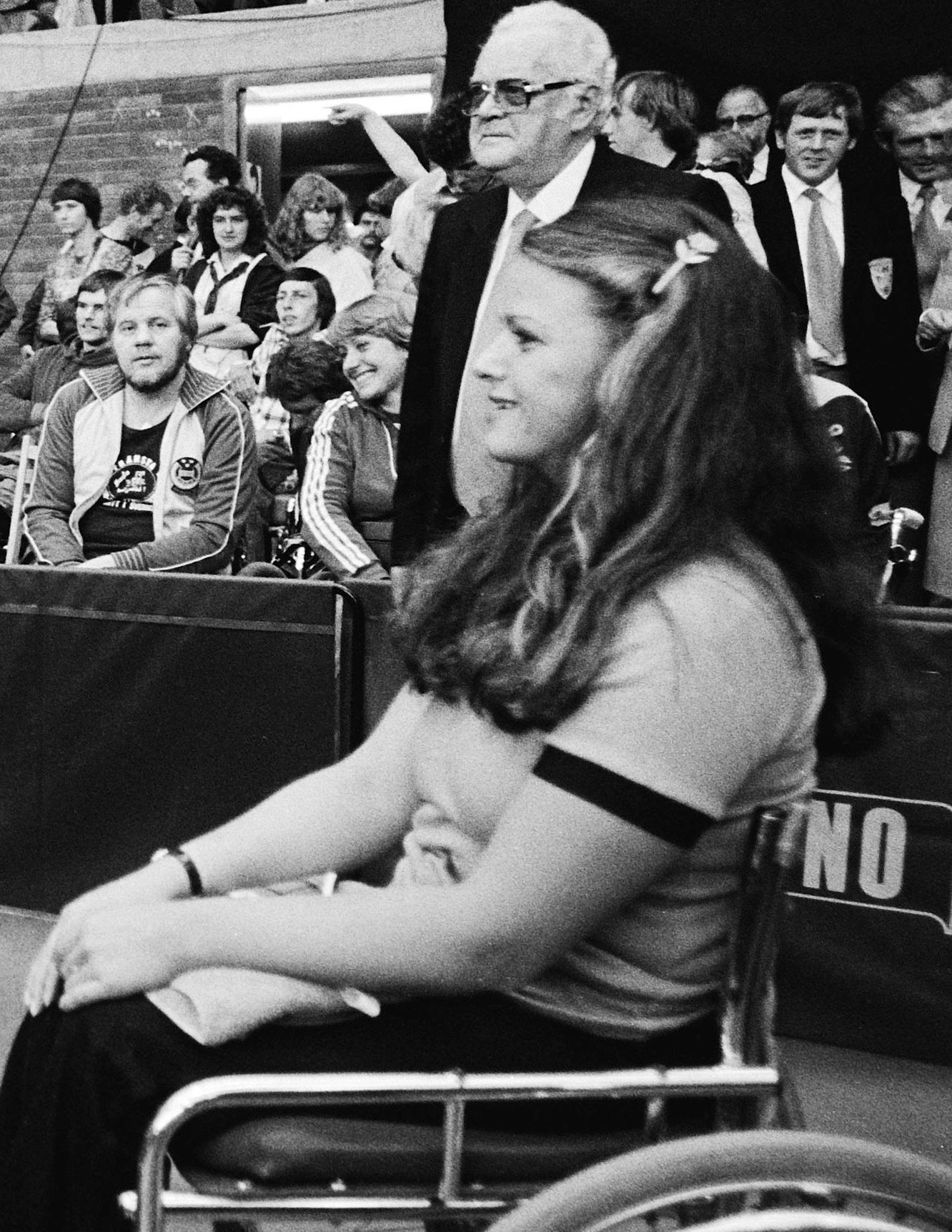 Olympische Spelen voor gehandicapten; Gerda Becker